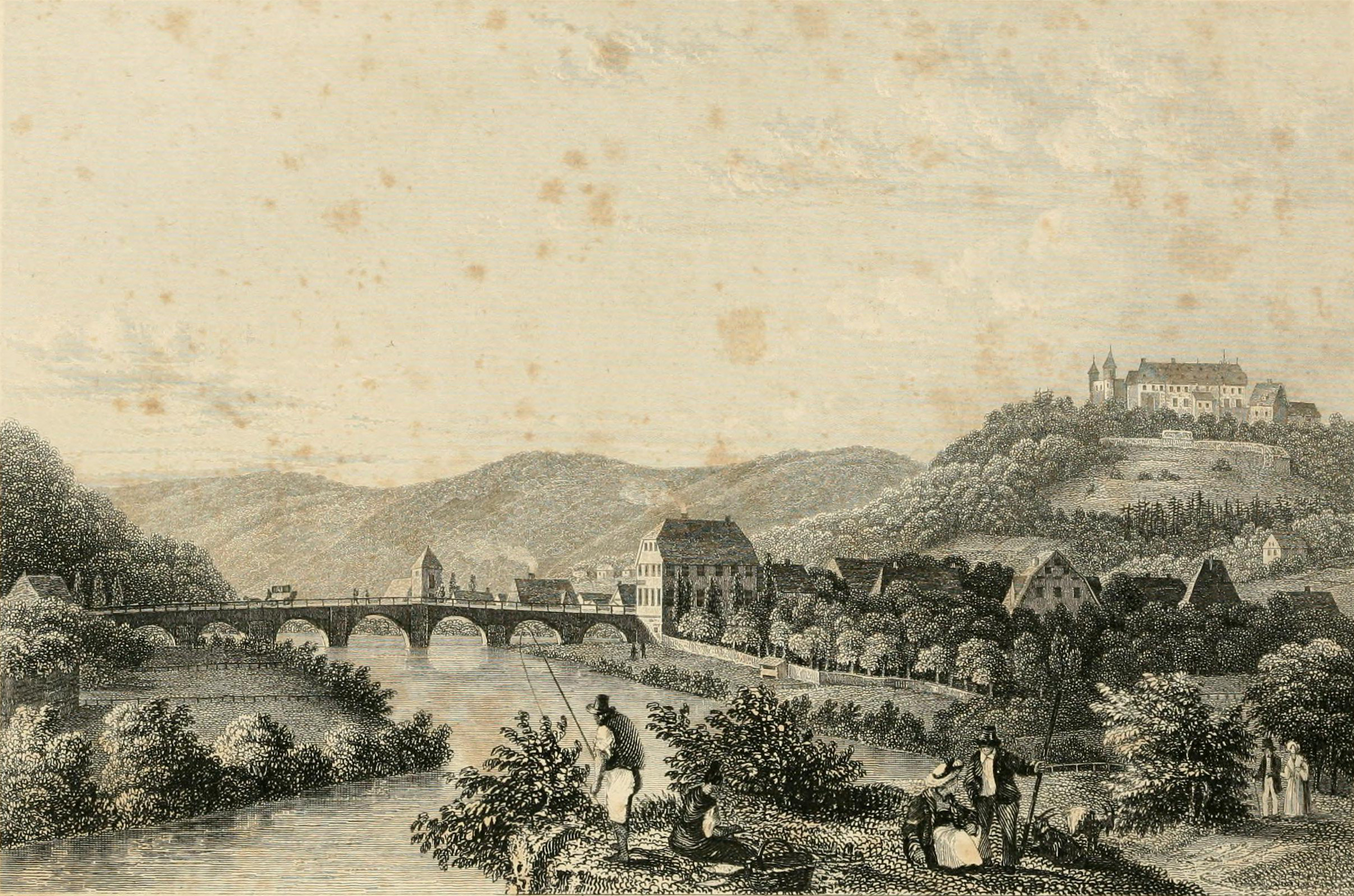 Limburg an der Lenne